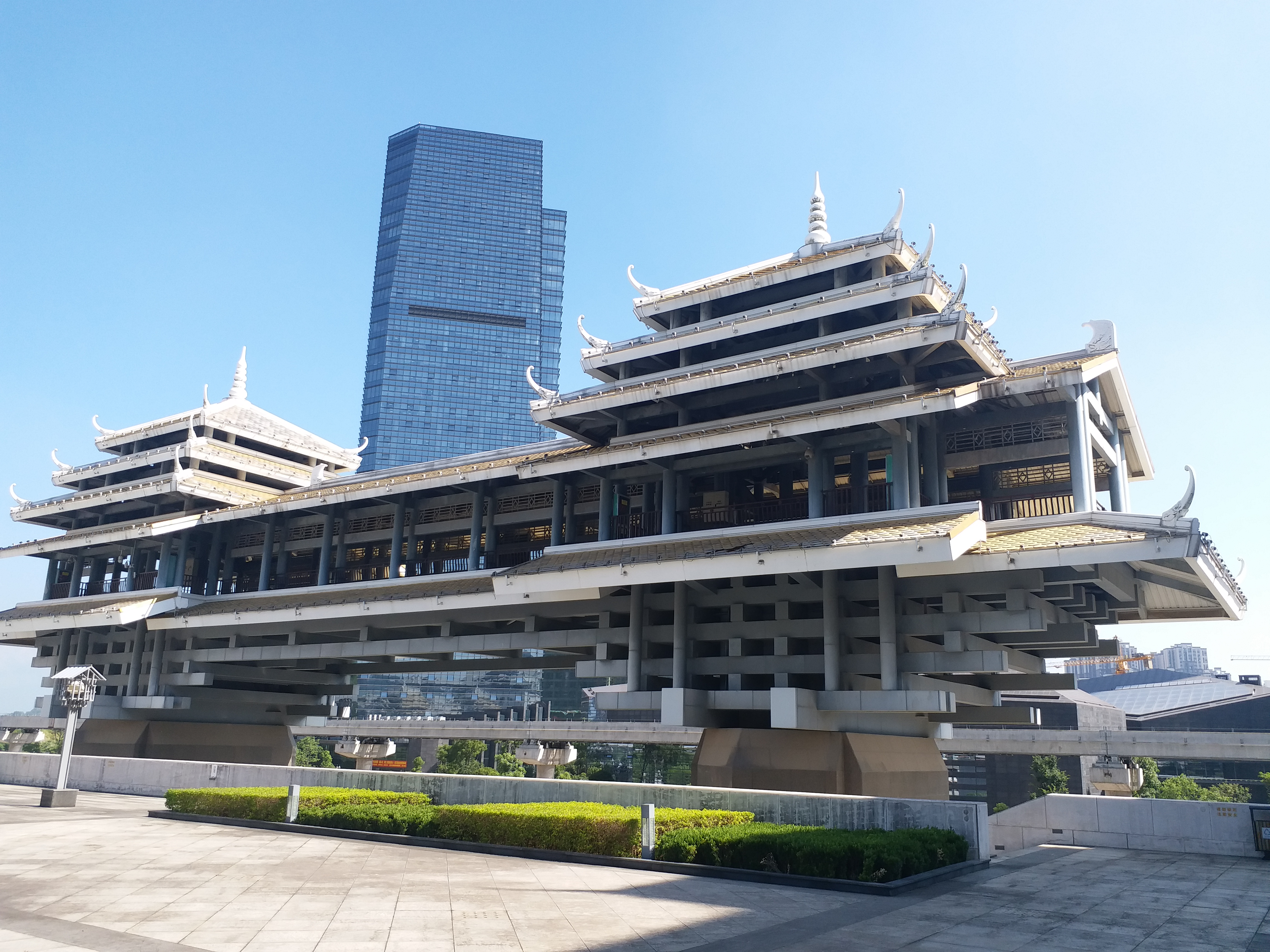 桂林一院两馆北阙